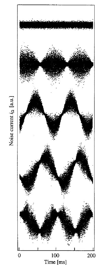 measured quantum noise squeezed coherent states